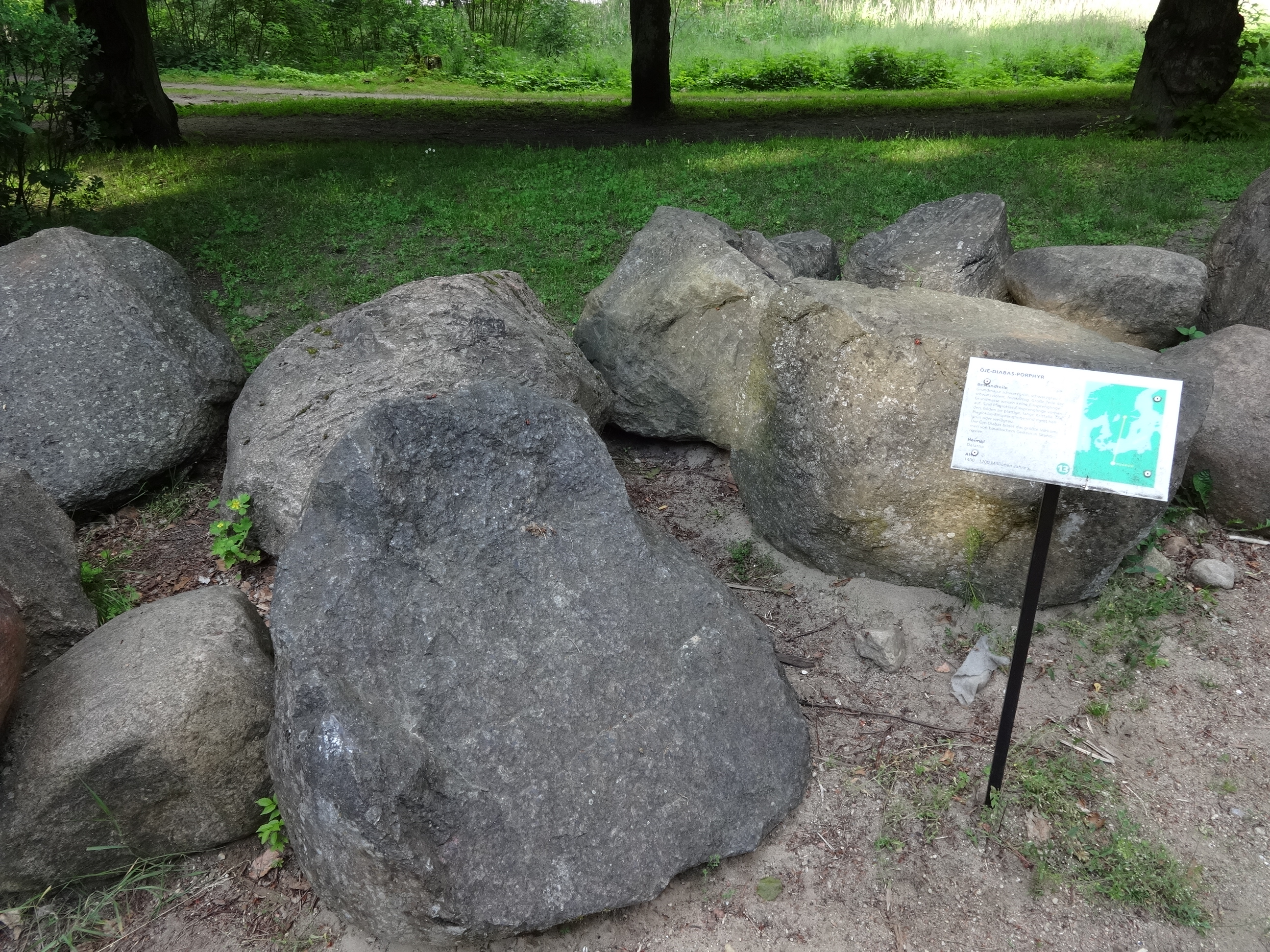 Eiszeitgarten Buckow (Märkische Schweiz) - eine gärtnerische Darstellung der eiszeitlich geprägten Landschaft um Buckow, gelegen im Lunapark an der Buckowseepromenade in Buckow